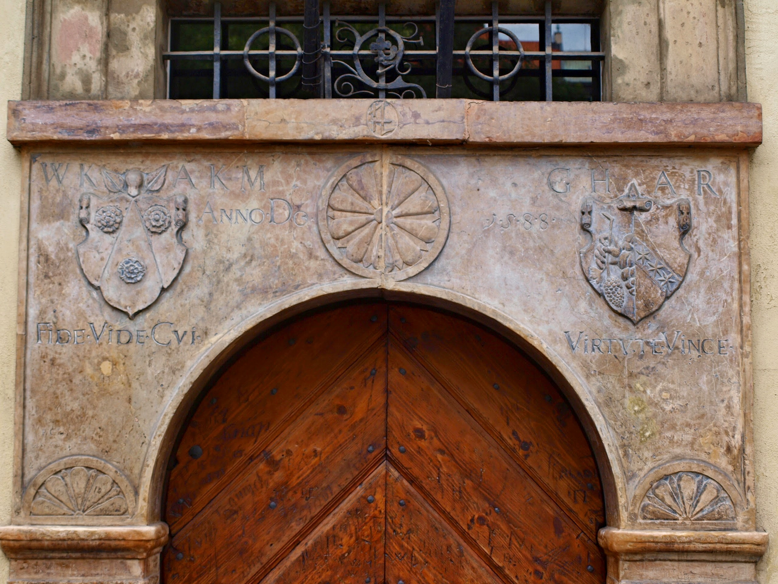 Svatojindřišská farní škola